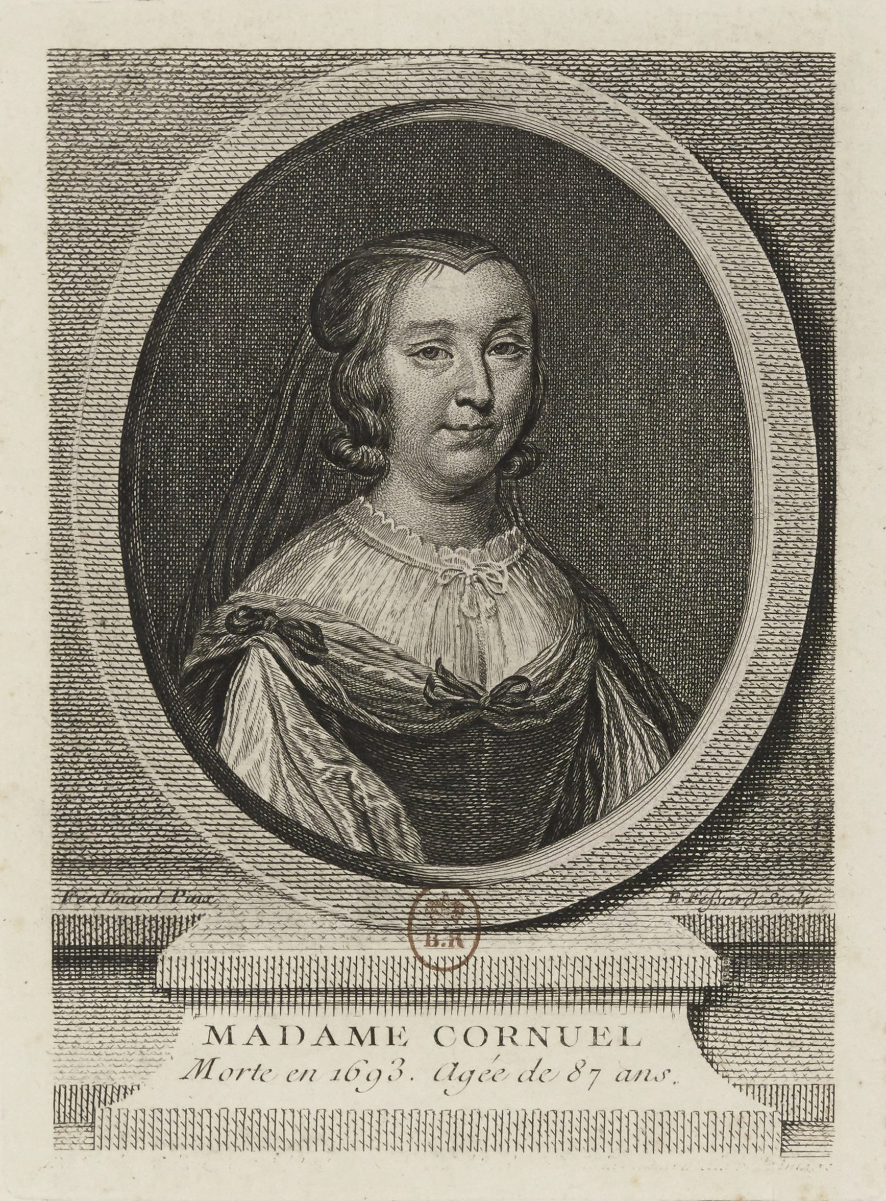 Anne-Marie Bigot de Cornuel, (1605 - 1694), femme de lettres, aphoriste et précieuse française.